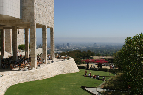 Vue des jardins du Getty